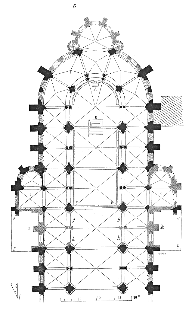 ... La figure 6 donne le plan de la partie postérieure de la cathédrale de Sens. Ce plan, restitué d'après les fouilles, ne laisse voir qu'un embryon de transsept indiqué par les deux chapelles, C, C. La nef et les collatéraux sont divisés par travées égales sans interruption, les espacements entre les piles sont même d'une régularité parfaite. Alors (à la fin du XIIe siècle) la cathédrale de Sens se rattachait donc au plan qui semblait adopté pour les églises épiscopales du domaine royal, comme disposition générale, bien qu'elle conservât des points de rapports avec les monuments de Champagne, et notamment avec la cathédrale de Langres ...